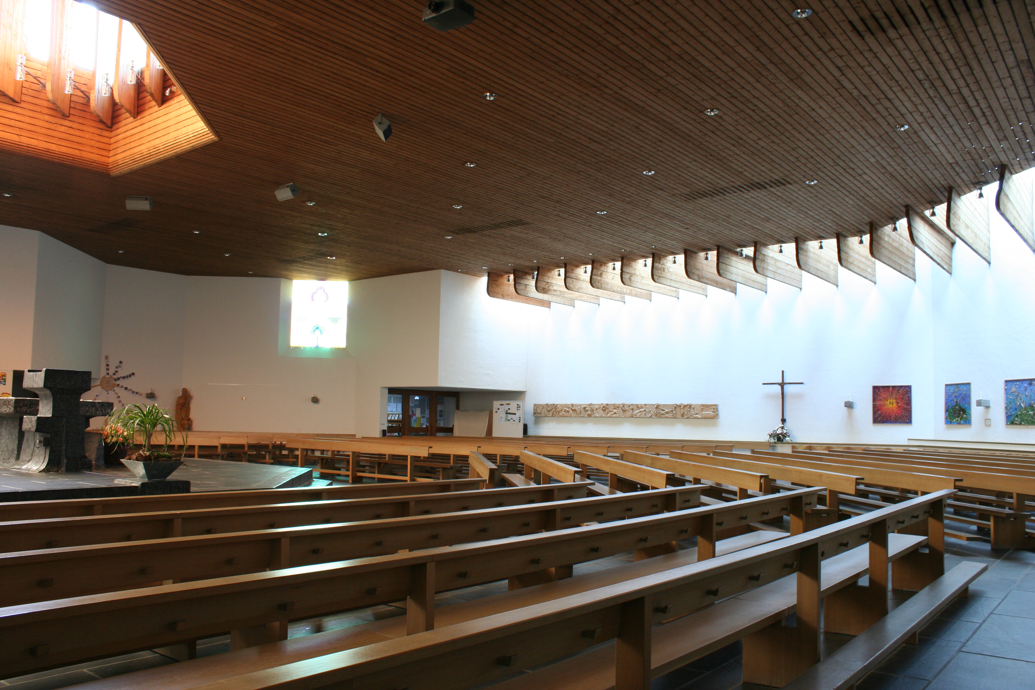 Römisch-katholische Pfarrikirche St. Niklaus Hombrechtikon, Innenansicht von Westen